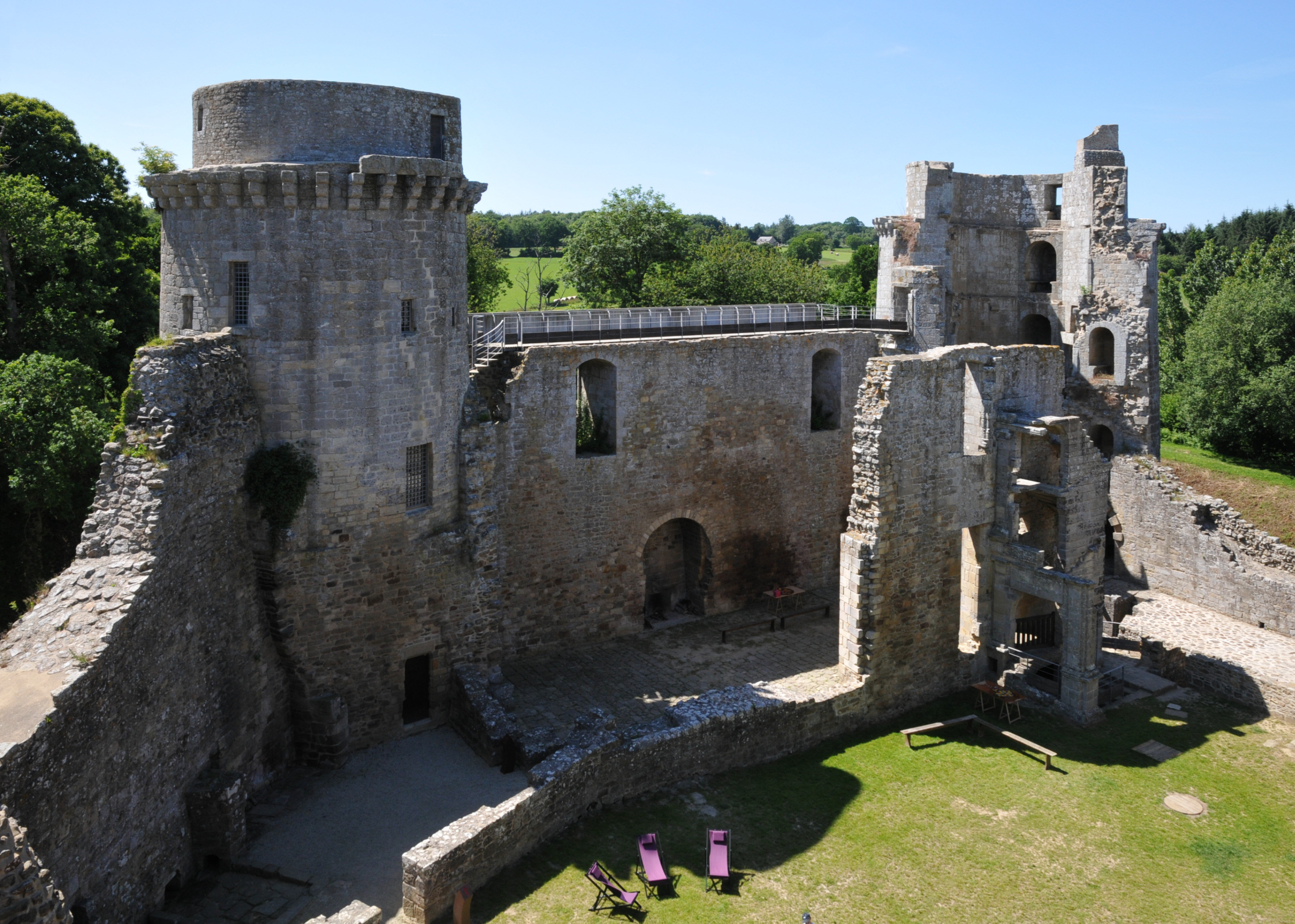 Innenansicht der nordwestlichen Seite der Burgruine La Hunaudaye, Frankreich